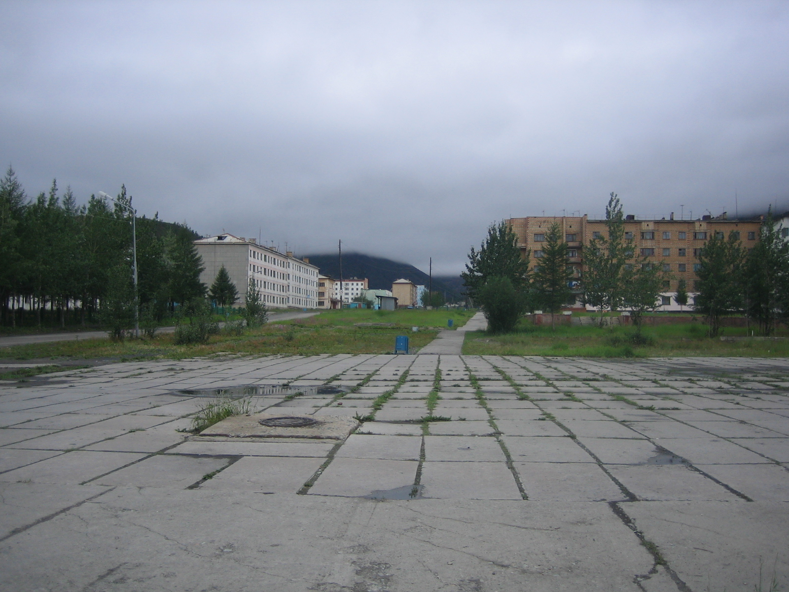 Центральная площадь Омсукчана